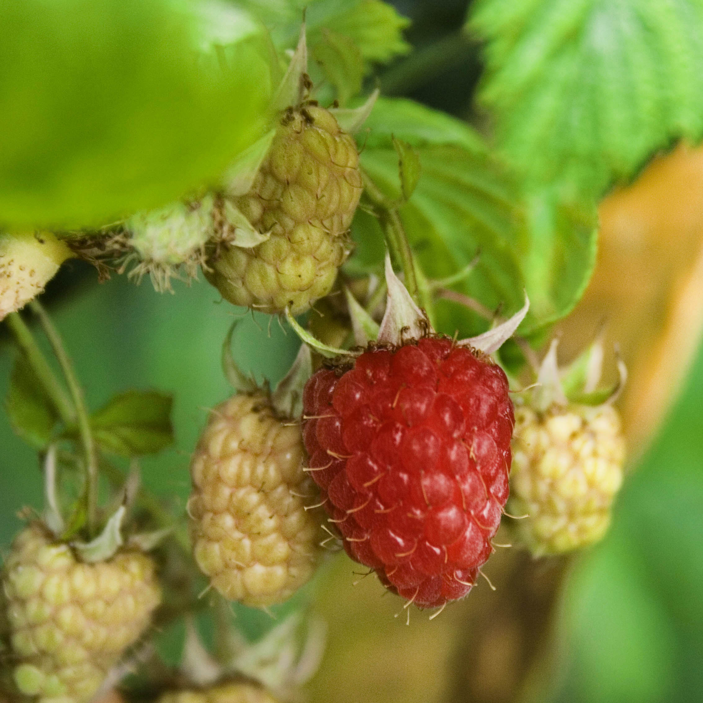 Málna gyümölcs érés közben.